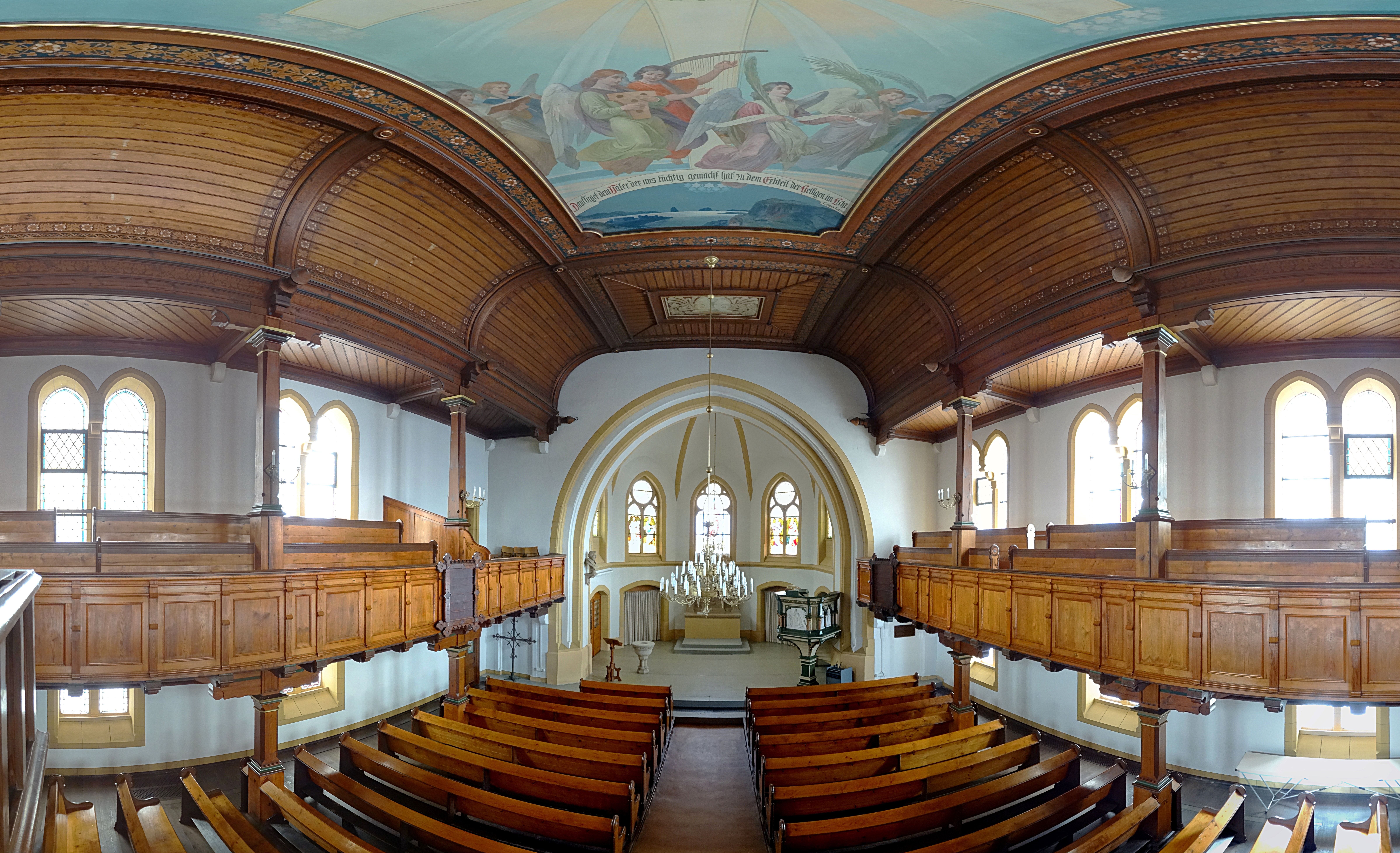 Innenraum Panorama Dorfkirche Hörnitz